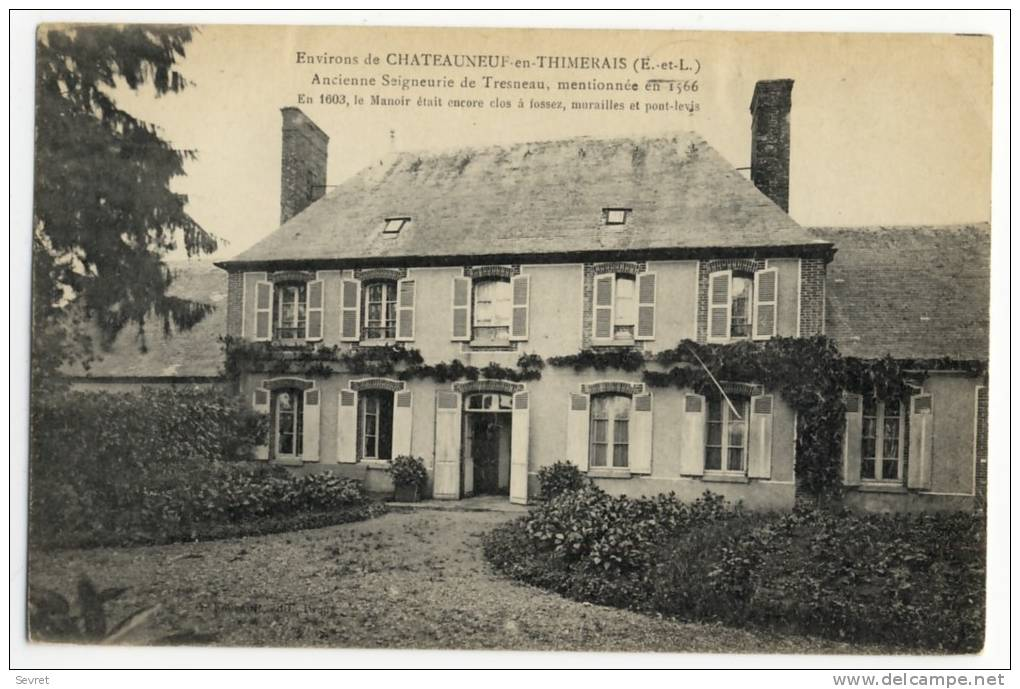 Carte postale ancienne représentant la ferme de Tresneau, aux environs de Châteauneuf en Thymerais, avec l'inscription : "ancienne seigneurie de Tresneau mentionnée en 1566. En 1603, le manoir était encore clos, à fossés, murailles et pont-levis. "